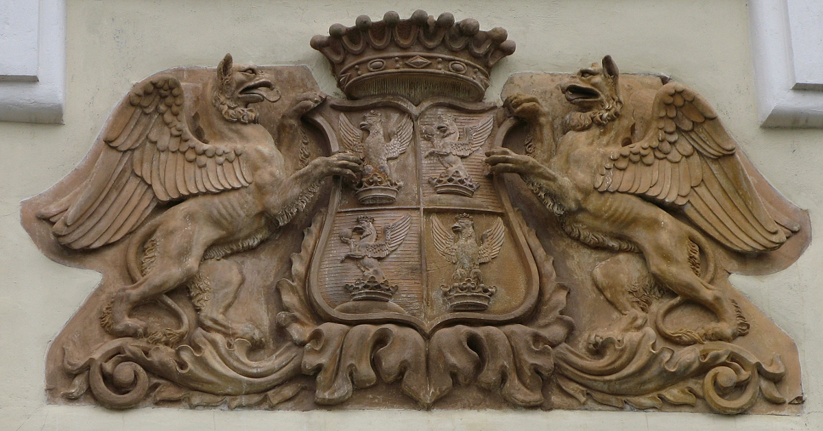 Grb obitelji Drašković na fasadi dvorca Trakošćan